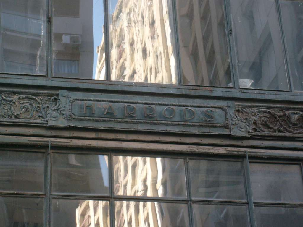 Harrods (Buenos Aires)